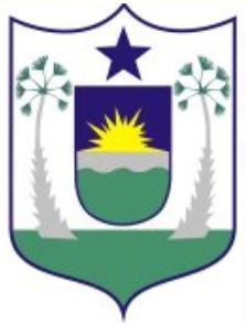 Brasão do município de Limoeiro do Norte, estado do ceará, brasil.